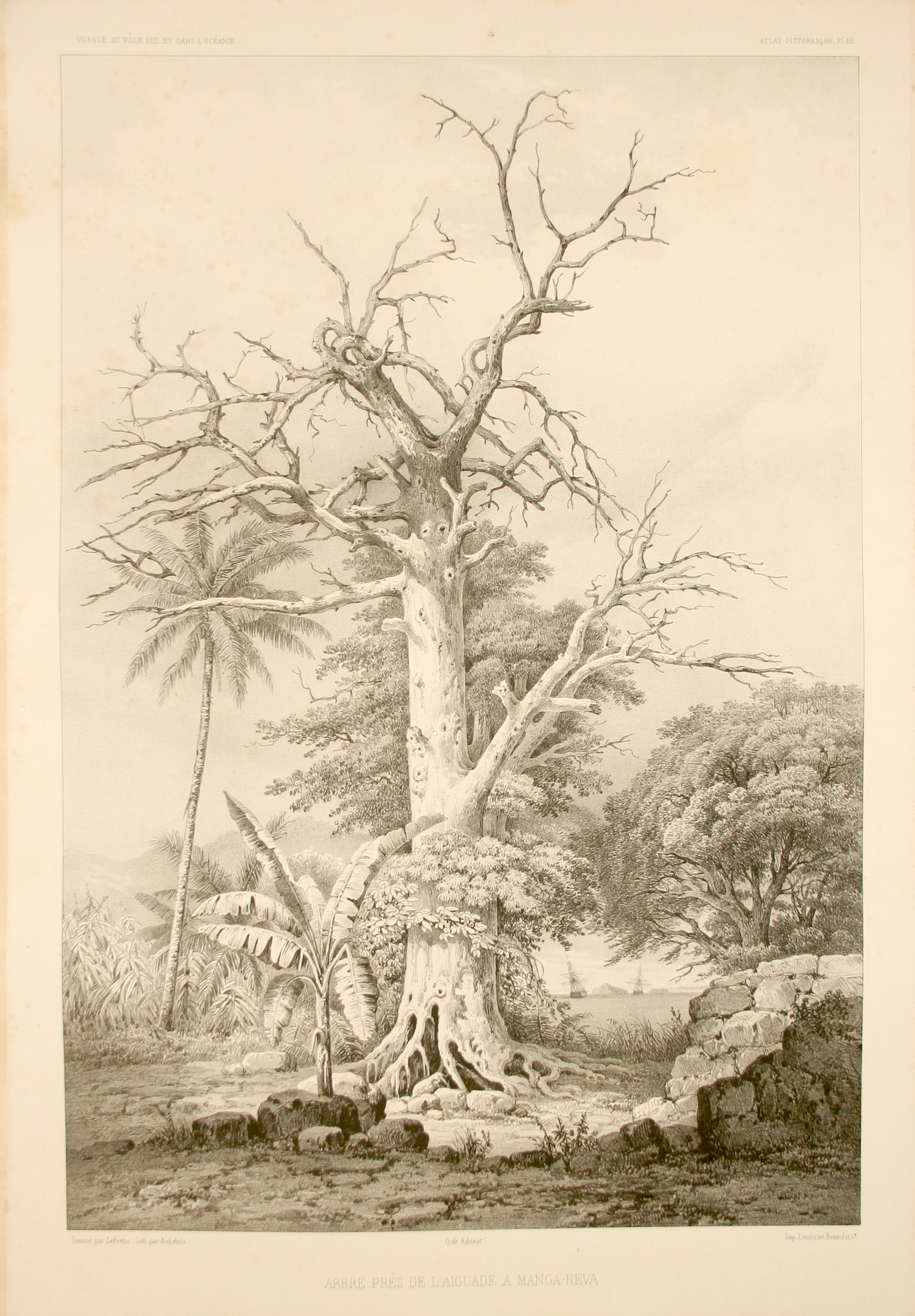 Arbre près de l'aiguade à Manga-Reva. Atlas pittoresque, planche 42